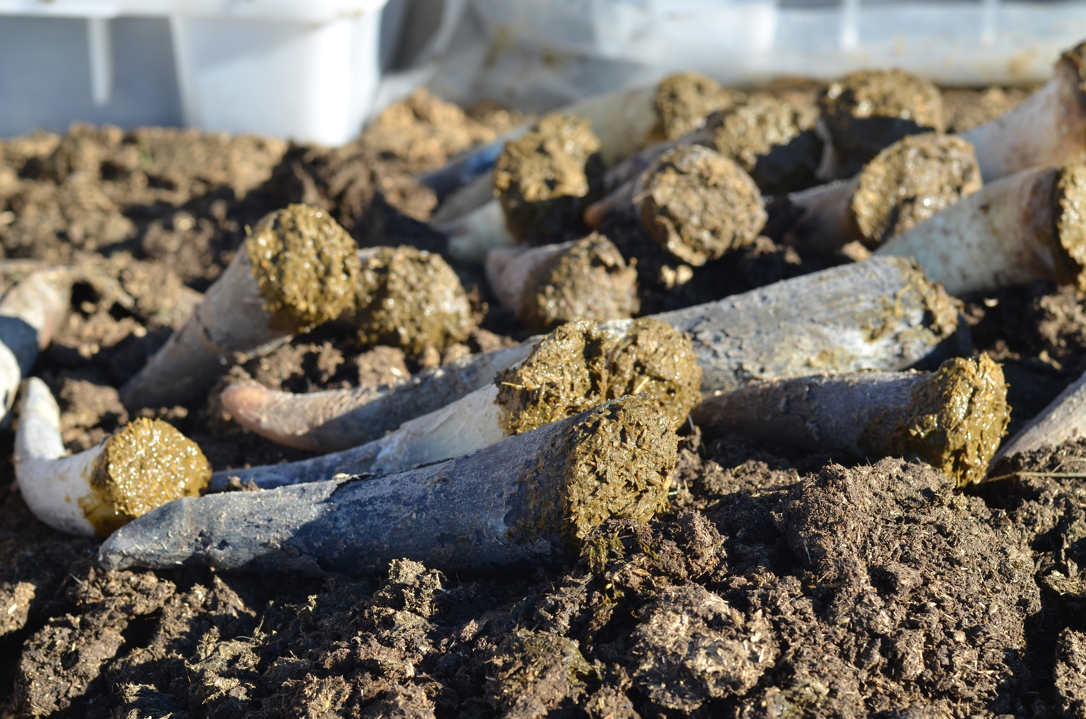 Cornes de vache emplies de bouses prêtes à être enfouies